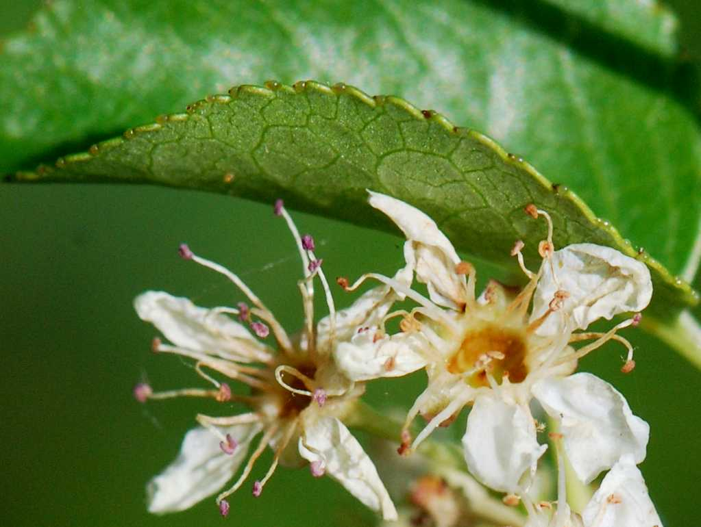 Prunus mahaleb marge des feuilles glanduleuse,Roche Guyon